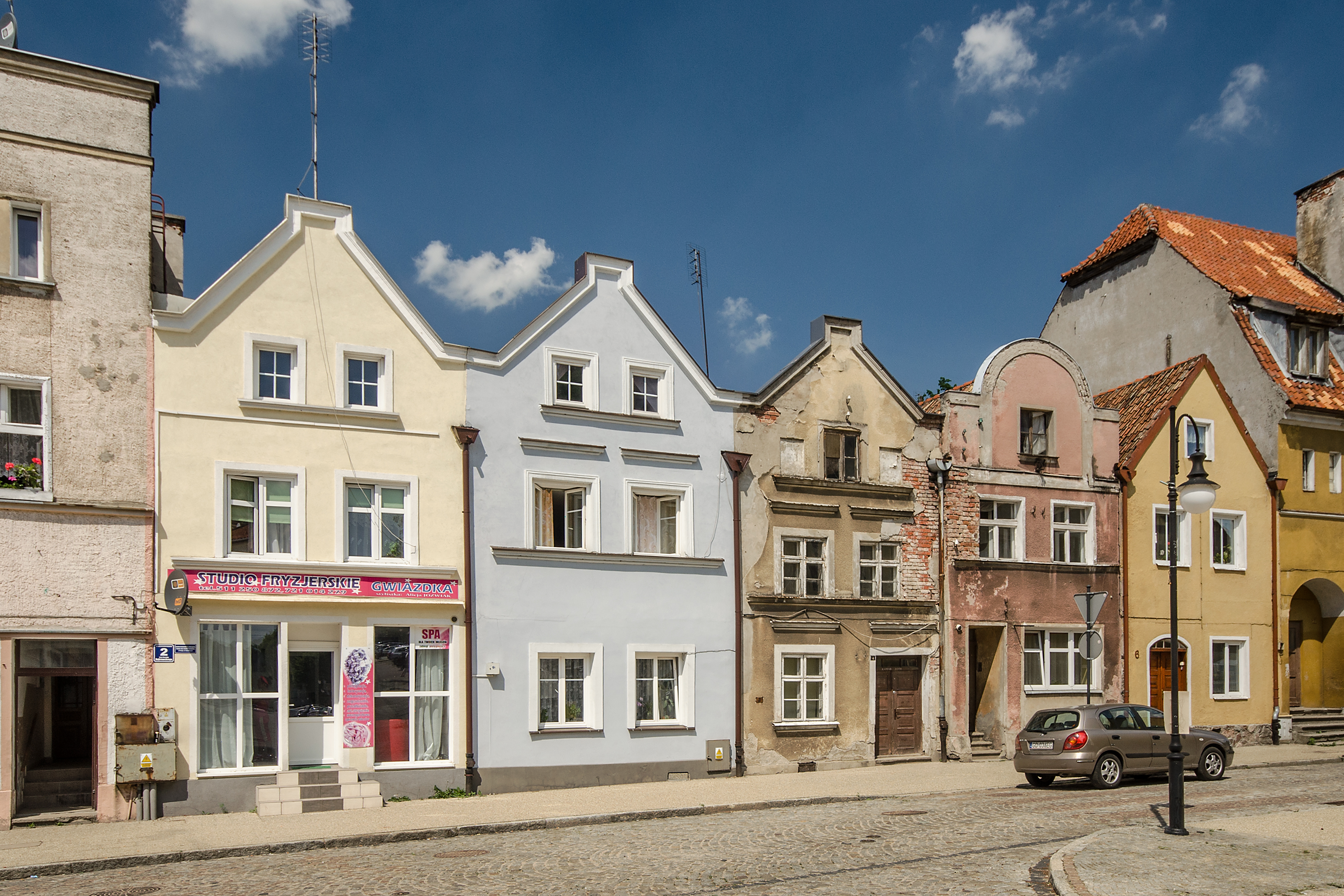 Pasłęk, dom, kon. XVIII